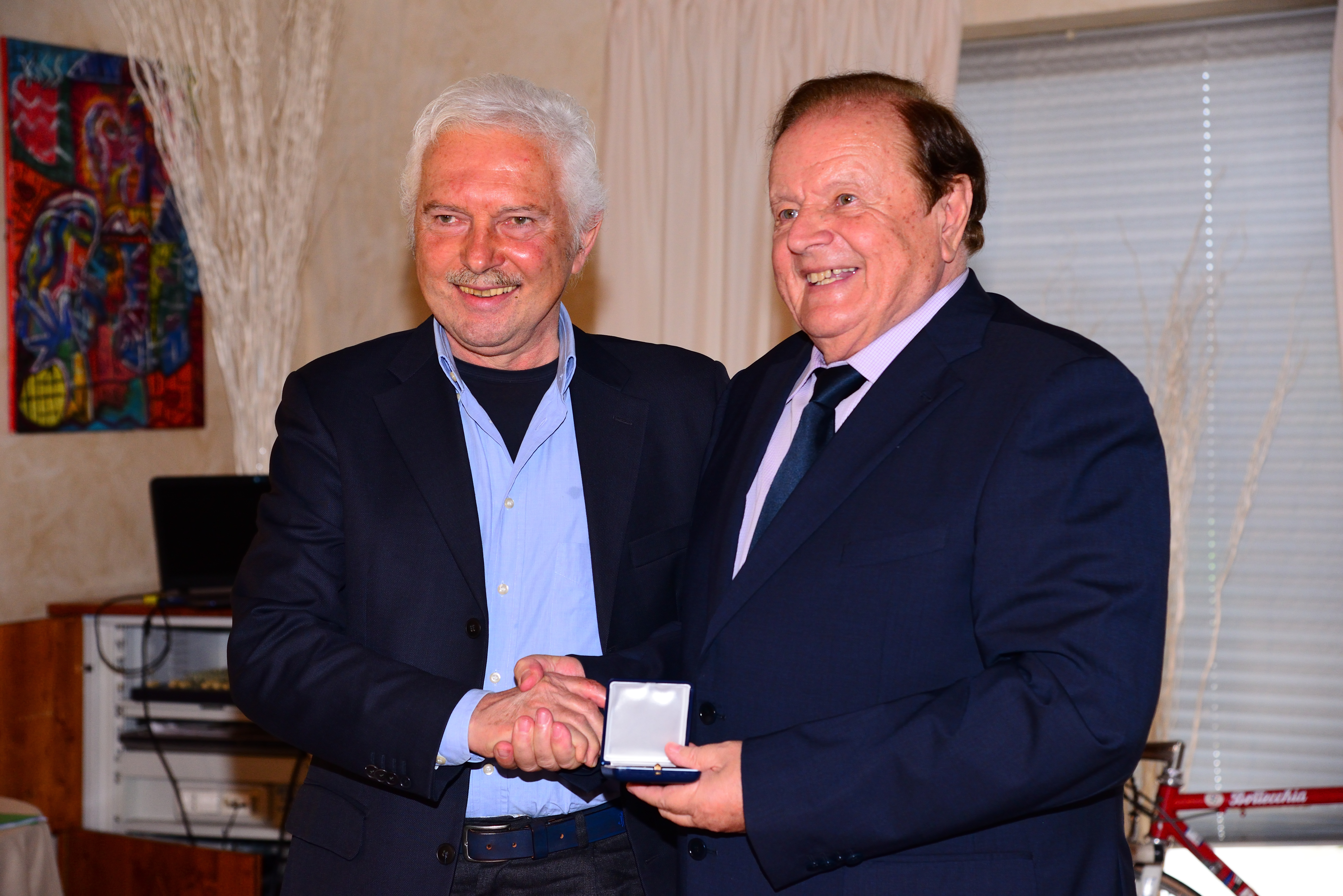 Savio Gianni con Gregolon Mario patron della Zg Mobili al pranzo del ritrovo ex ciclisti Zg Mobili del Novembre 2018